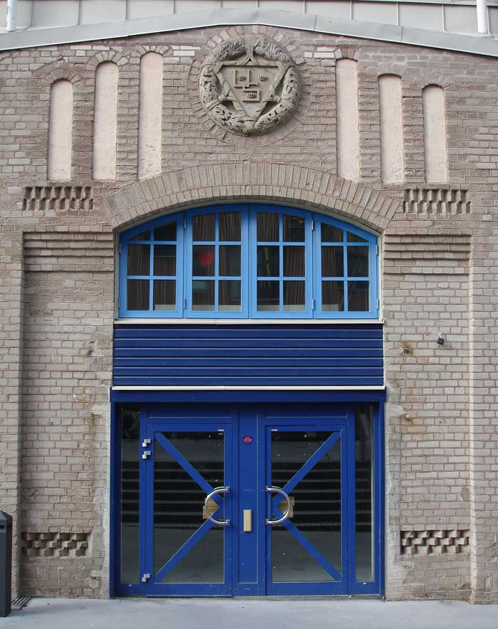 Ingången till f.d. sliperibyggnad tillhörande Umeå träsliperi, AB Scharins Söner. Numera en del av Konstnärligt campus i Umeå. Notera firmamärket över porten, med bokstäverna US (Unander-Scharin). Byggnaden ritades av Sigge Cronstedt.